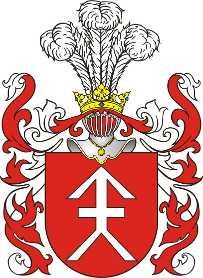 Clan Kosciesza